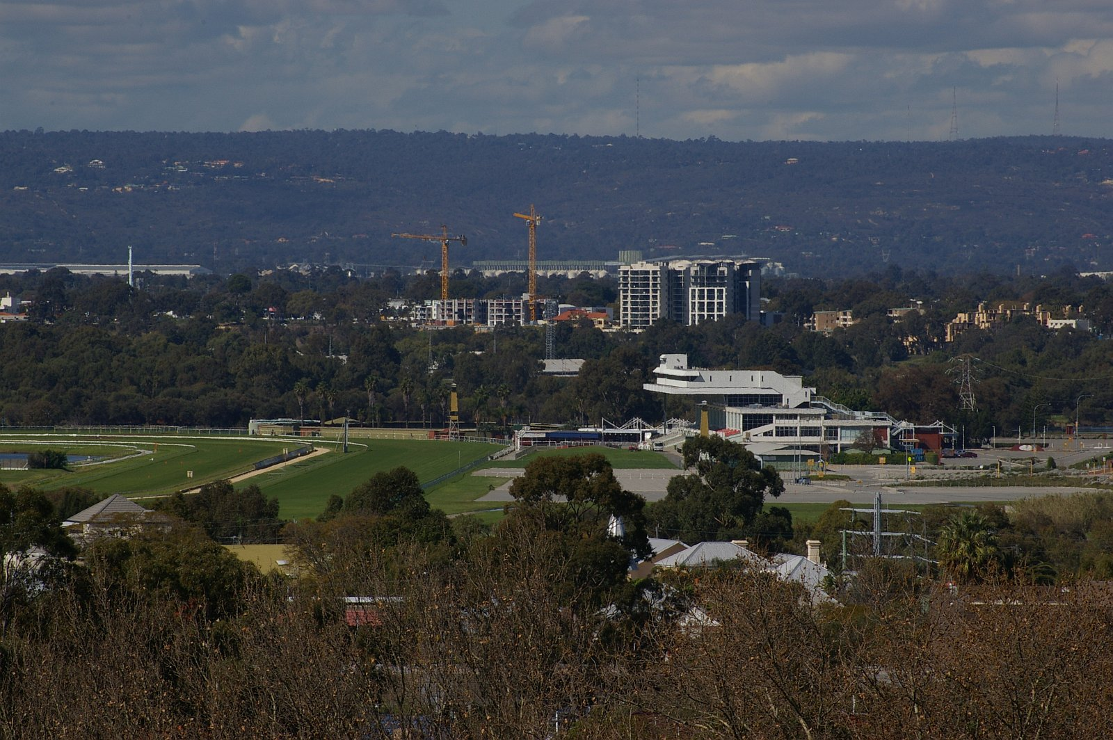 Belmont Park race course